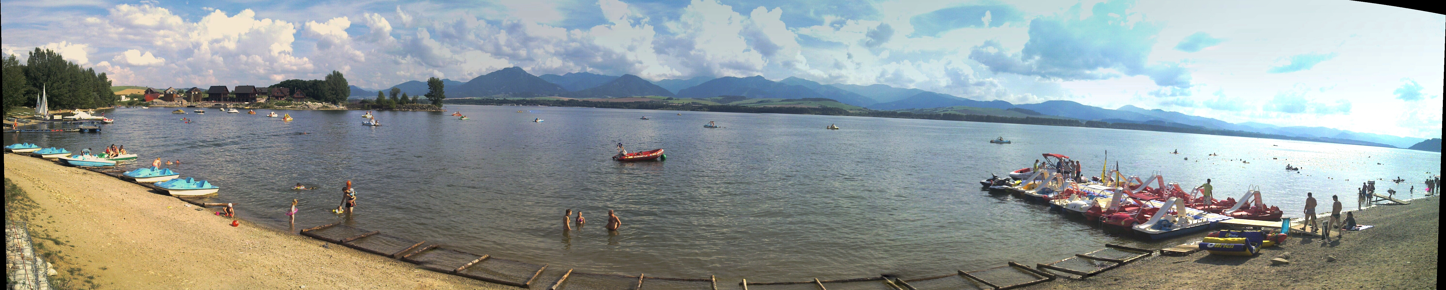 Liptovská Mara a Nízké Tatry foceno z pláže v Lipt. Trnovci.